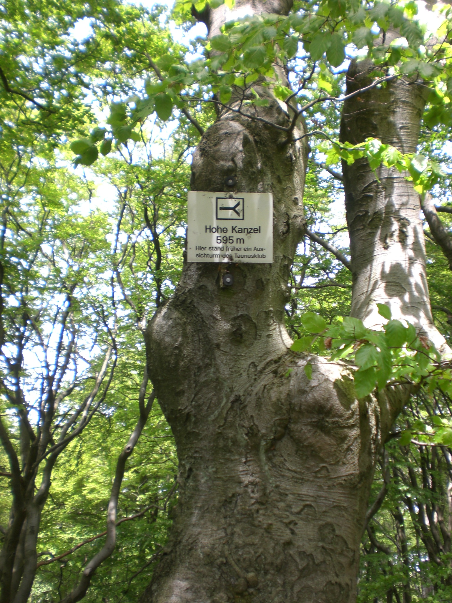 Auf der Hohen Kanzel 592 m ü. NHN im Taunus (Rheingau-Taunus-Kreis, Hessen) stand einmal ein Aussichtsturm des Taunusklubs. Der Berg liegt bei km 23,0 des Wanderweges Nr. 6 (Hofheim - Wetzlar / gekennzeichnet mit einem liegenden Y, wobei die Spitze in Wegrichtung Wetzlar zeigt).